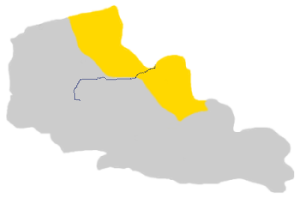 Localisation approximative de la flandre française avec tracé de la Lys.